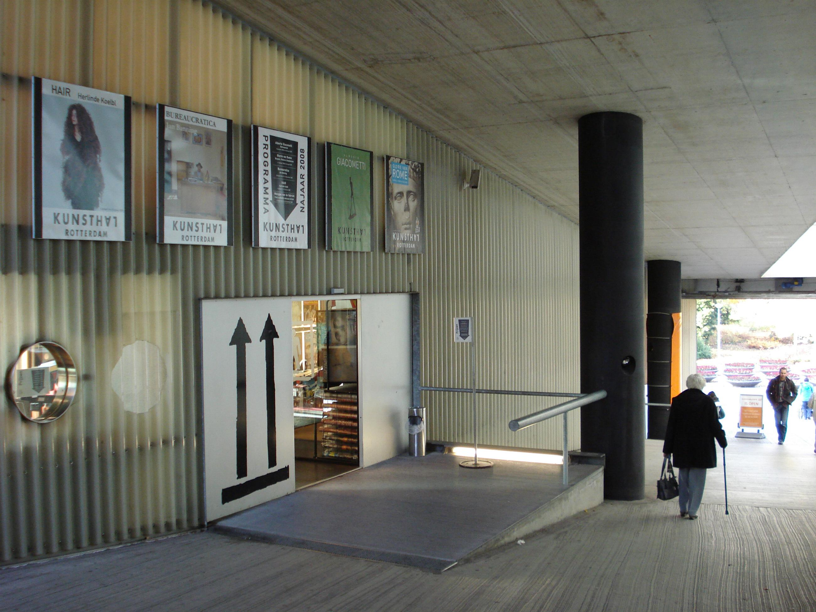 Rotterdam, kunsthal, ingang.